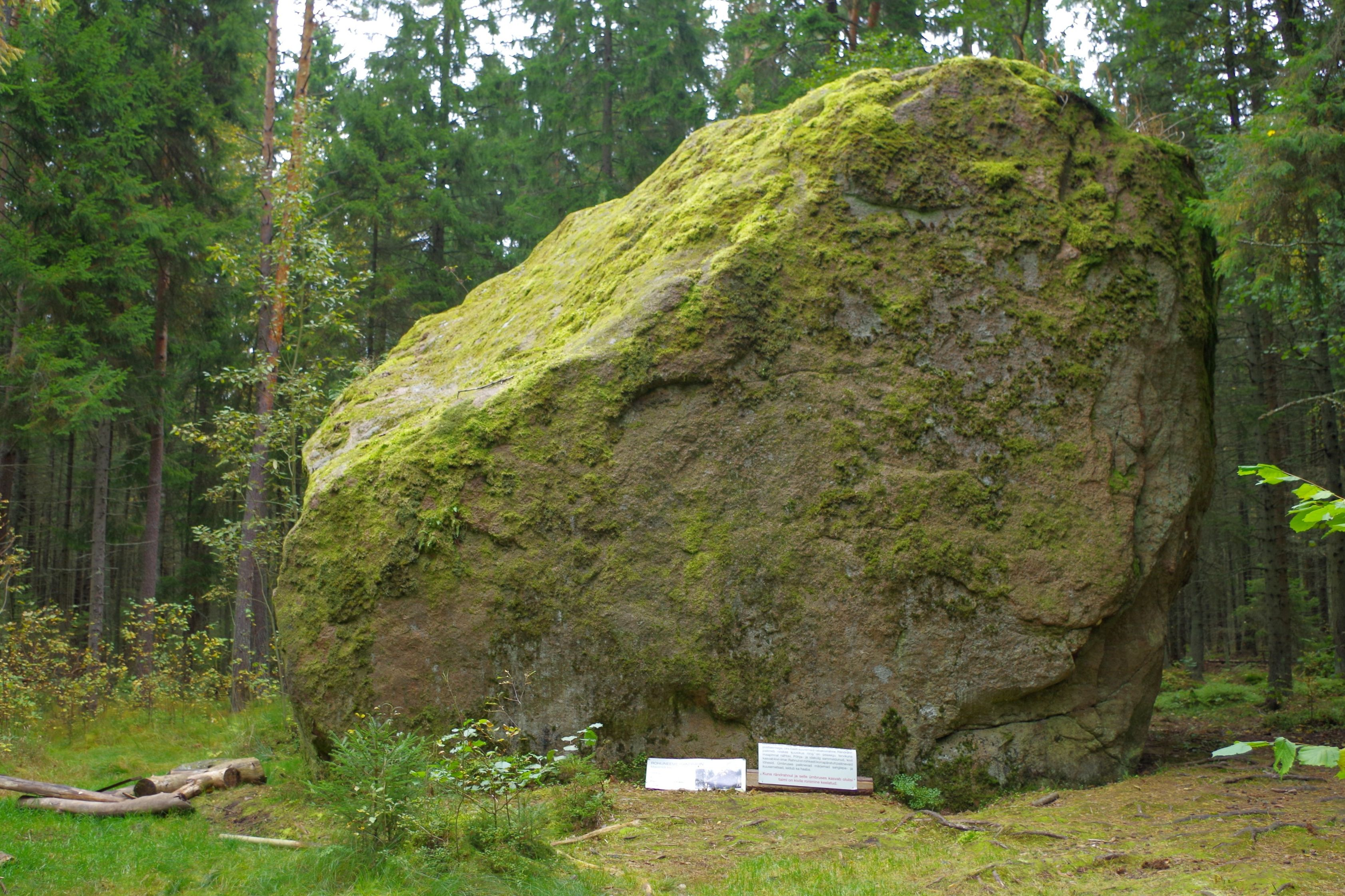 Rohuneeme rahn; Maisiniidi kivi